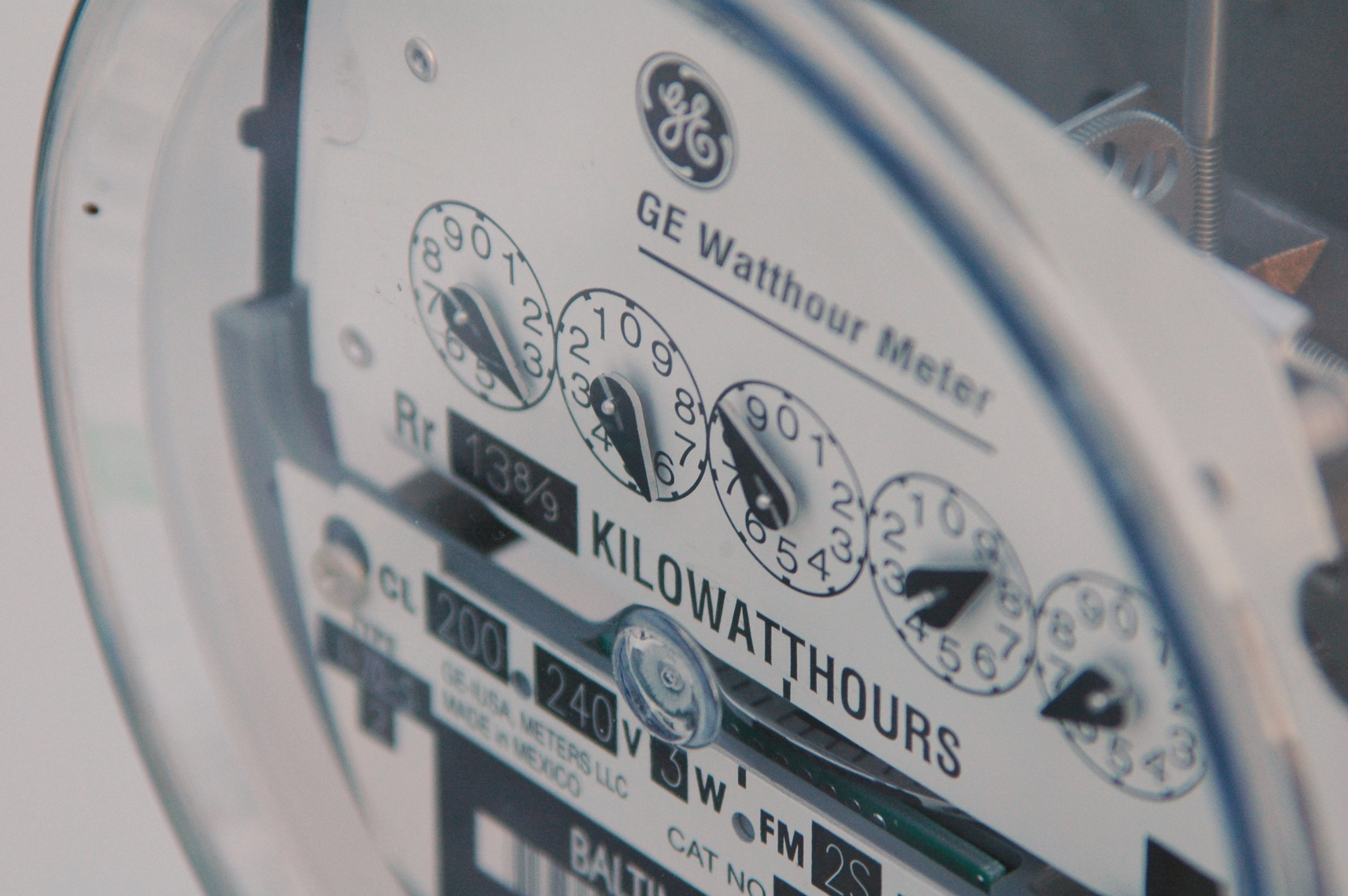 General Electric watthour meter.